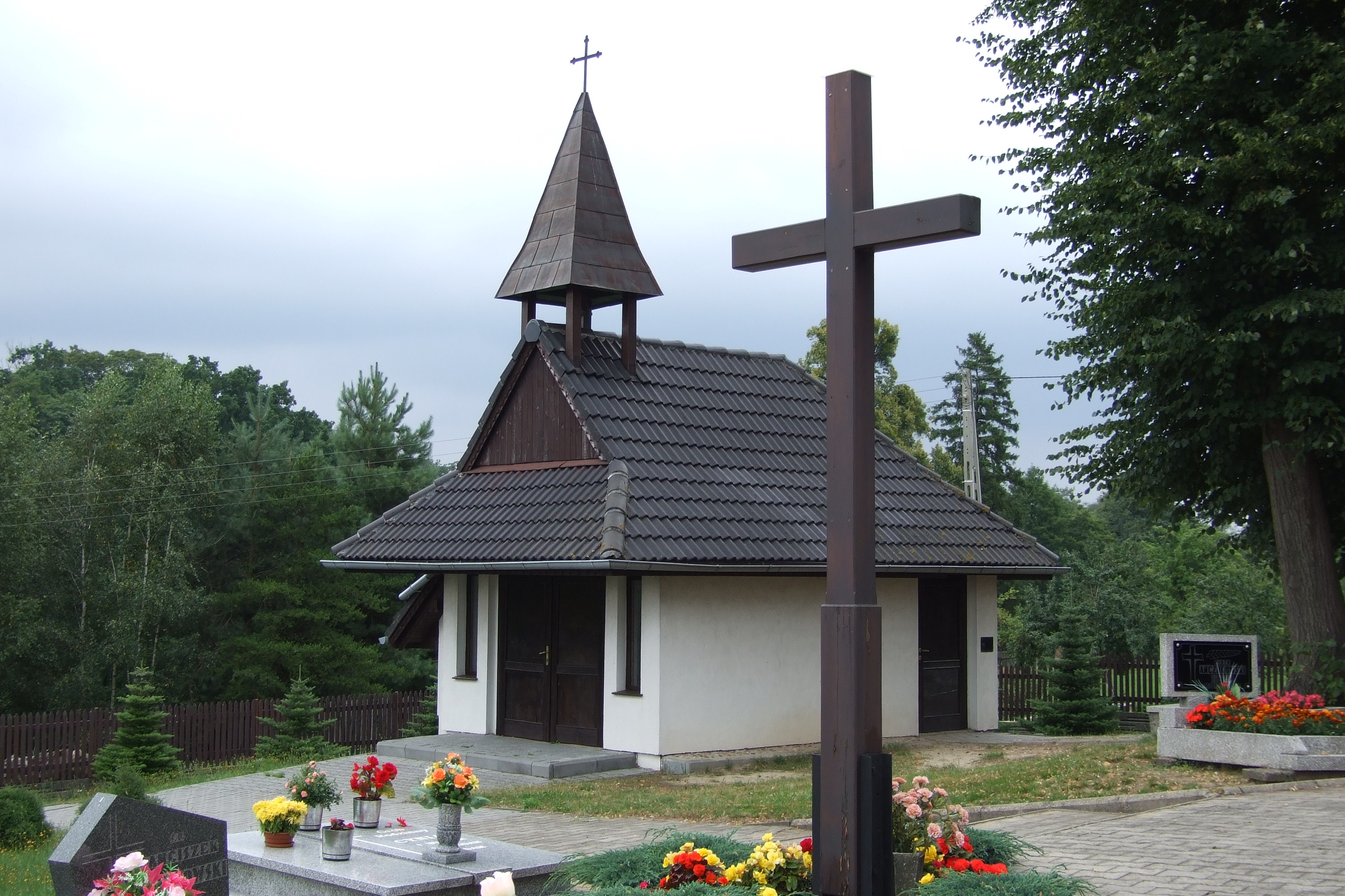 Kościół św. Marii Magdaleny w Boroszowie